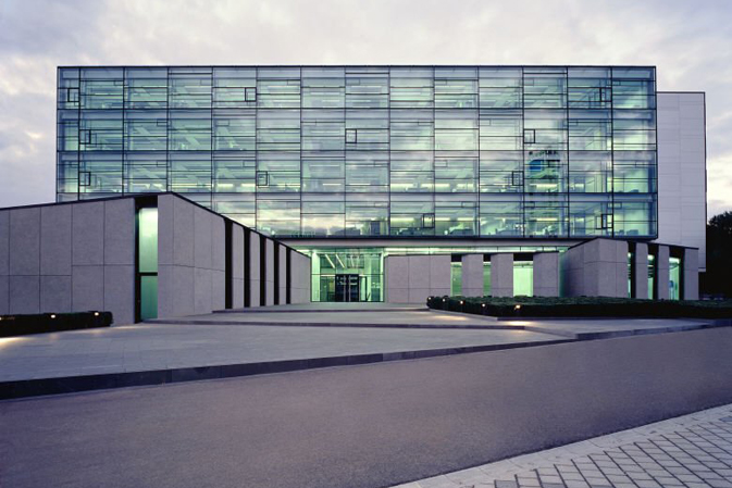 TRUMPF Vertriebs- und Servicezentrum am Stammsitz in Ditzingen